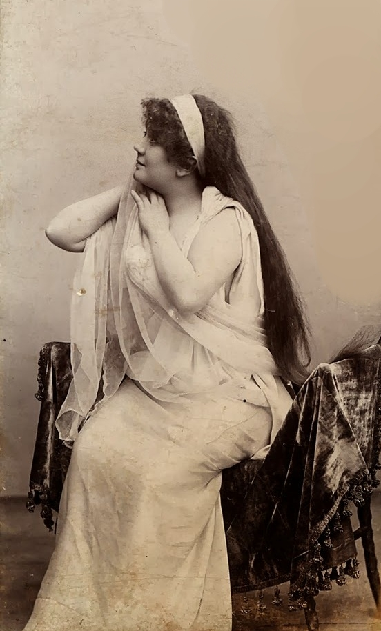 Küry Klára (1870–1935) színésznő, operettprimadonna.